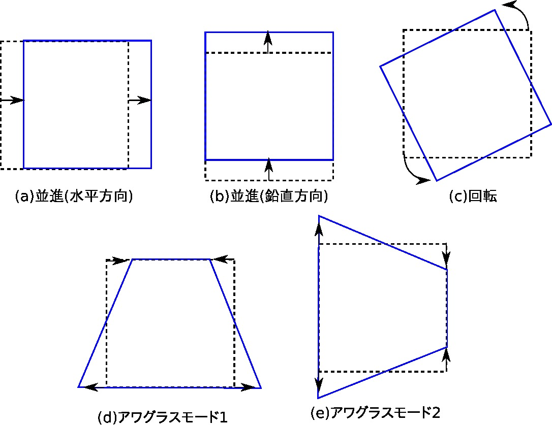 ひずみが0となる５つの変形モード